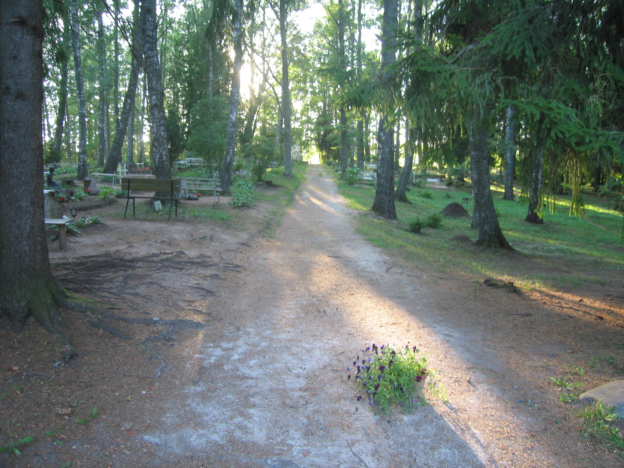 Kalmistu peatee.Foto: Robert Treufeldt, 2. august 2014